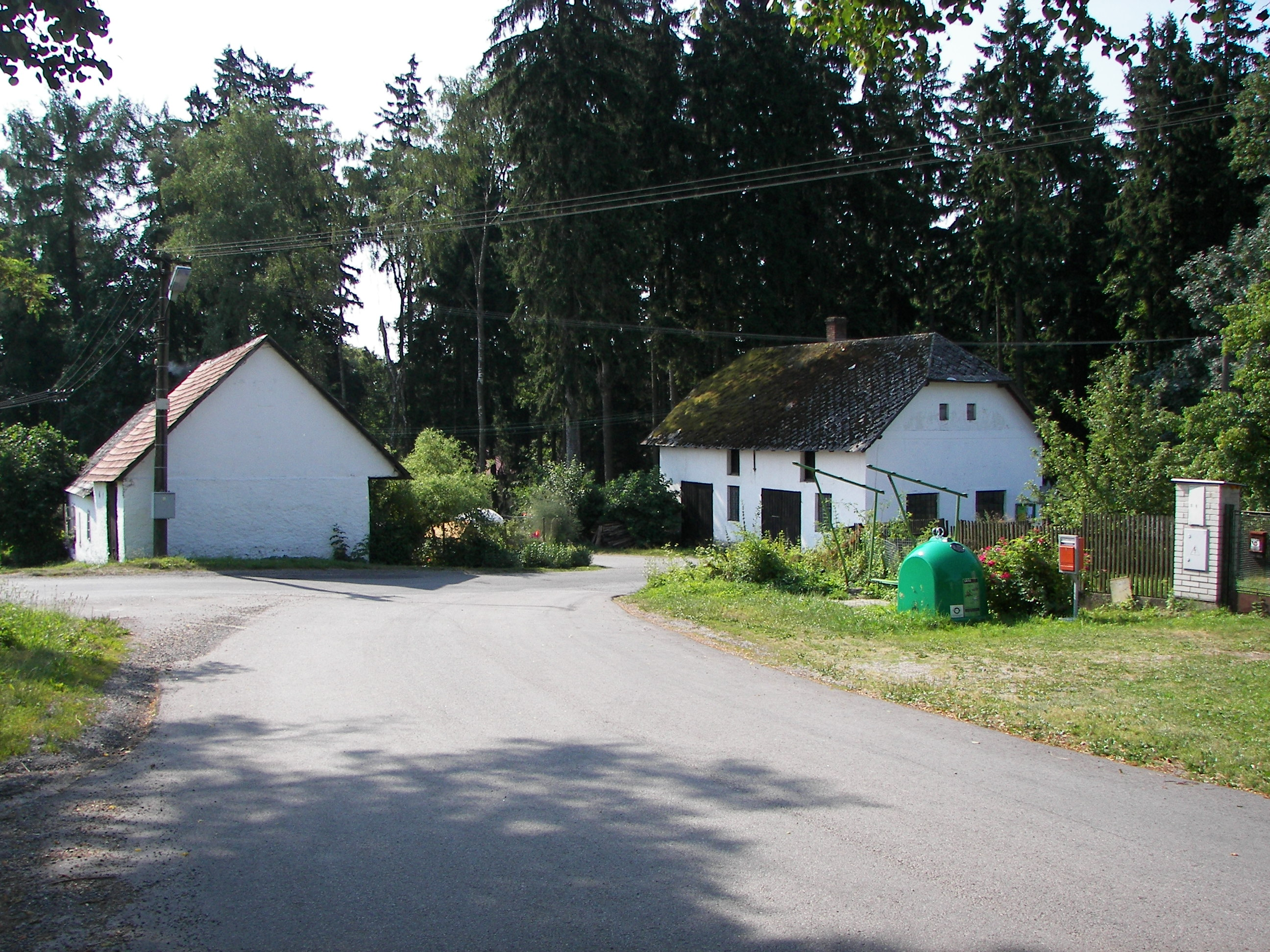 Oblajovice - střed obce